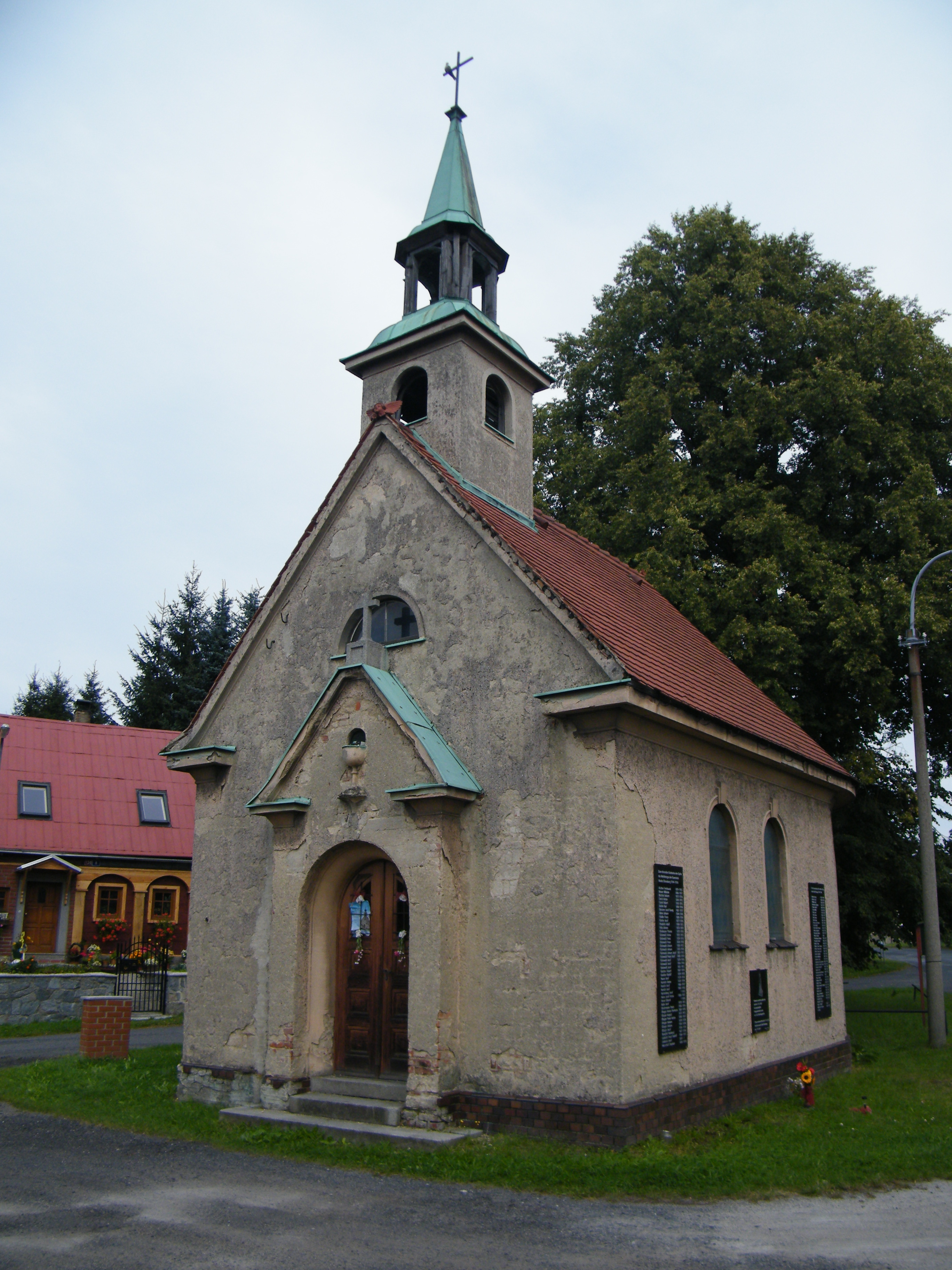 Kaple svaté Alžběty Durynské v Dolních Křečanech